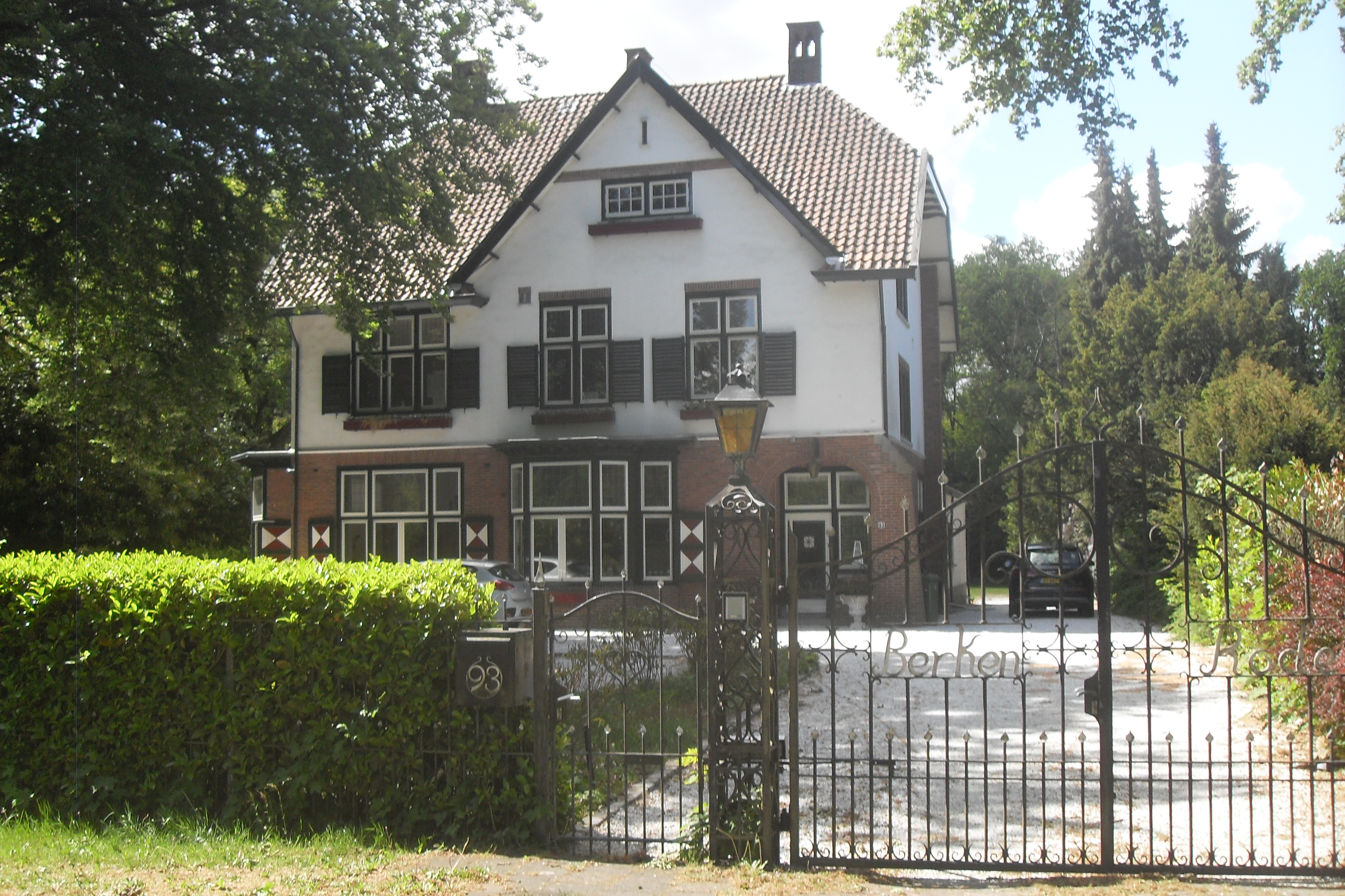 Afbeelding van de Villa gelegen in de wijk Oostereng, Bussum